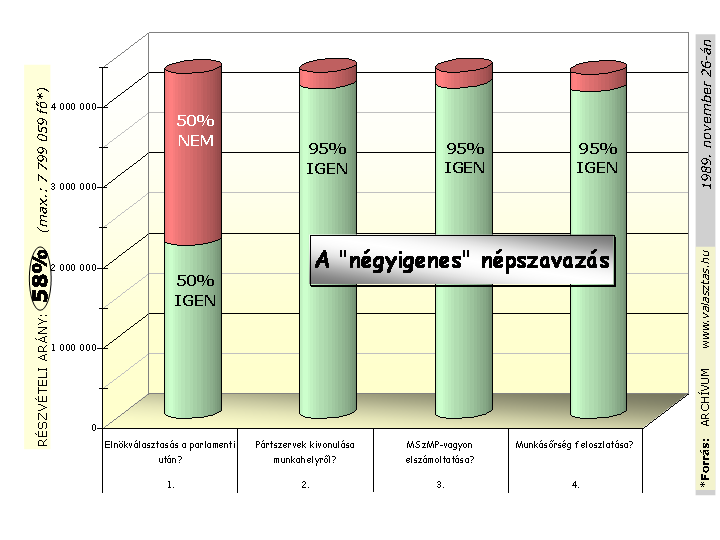 A "négyigenes" népszavazás eredménye (1989)